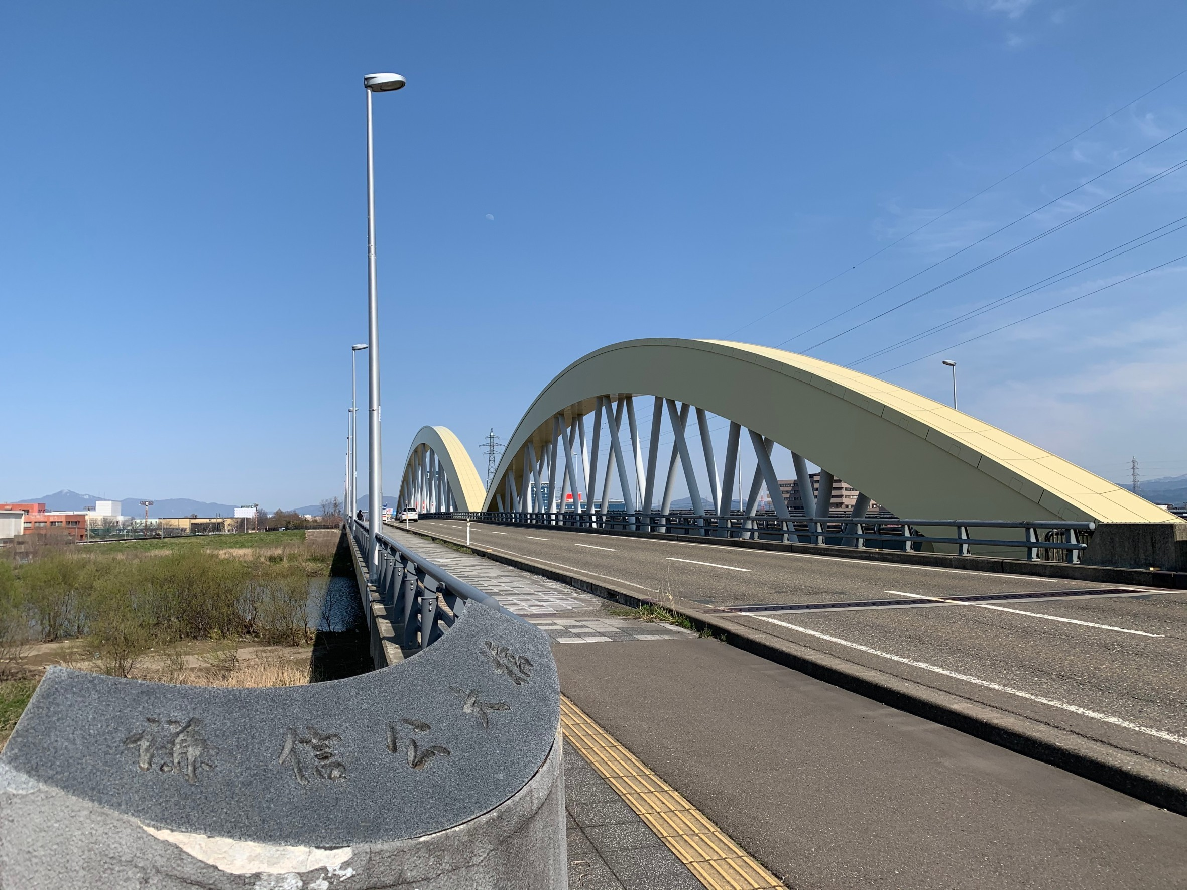 謙信公大橋（2020年4月）新潟県道43号上越安塚浦川原線